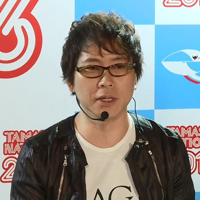 魂ネイション2016「置鮎龍太郎と語る! 『聖闘士星矢 黄金魂 -soul of gold-』 」